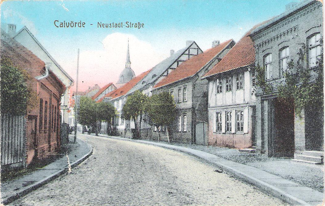 Calvörde-Neustadt, Partie in der Neustadtstraße, Postkarte 1900